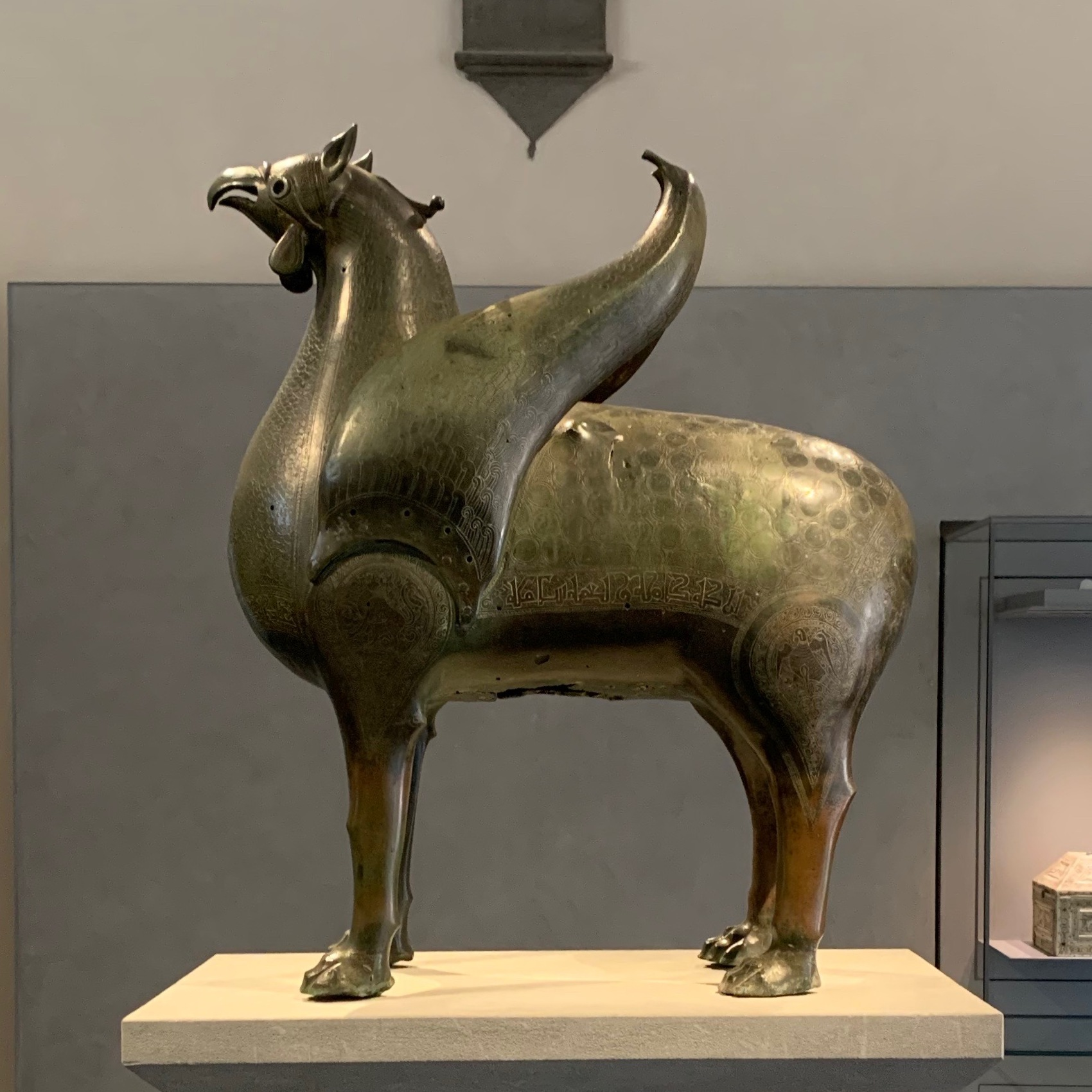 Grifone di Pisa al nuovo museo dell'opera del Duomo di Pisa